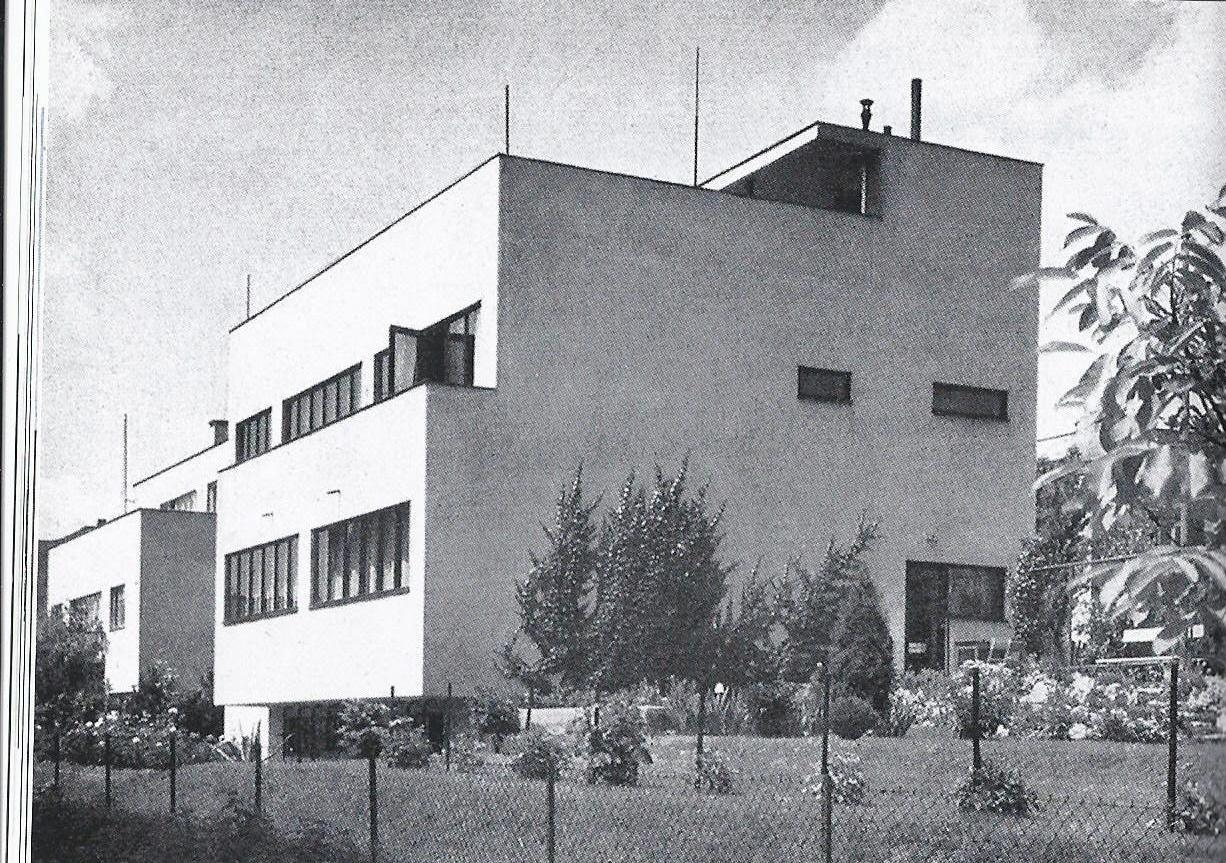 pohled na vilu Košťál na jihovýchodní nároží domu